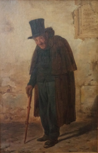 Filippo Palizzi (Vasto, 16 giugno 1818 – Napoli, 10 settembre 1899) “Antonio Rossetti”, 1848 Olio su tela, cm 39x25 Pinacoteca civica, Palazzo D’Avalos, Vasto. Nel quadro si legge: "Antonio Rossetti frisore da donna ed incolto natural poeta". (Fonte Vasto Gallery di Filippo Marino)